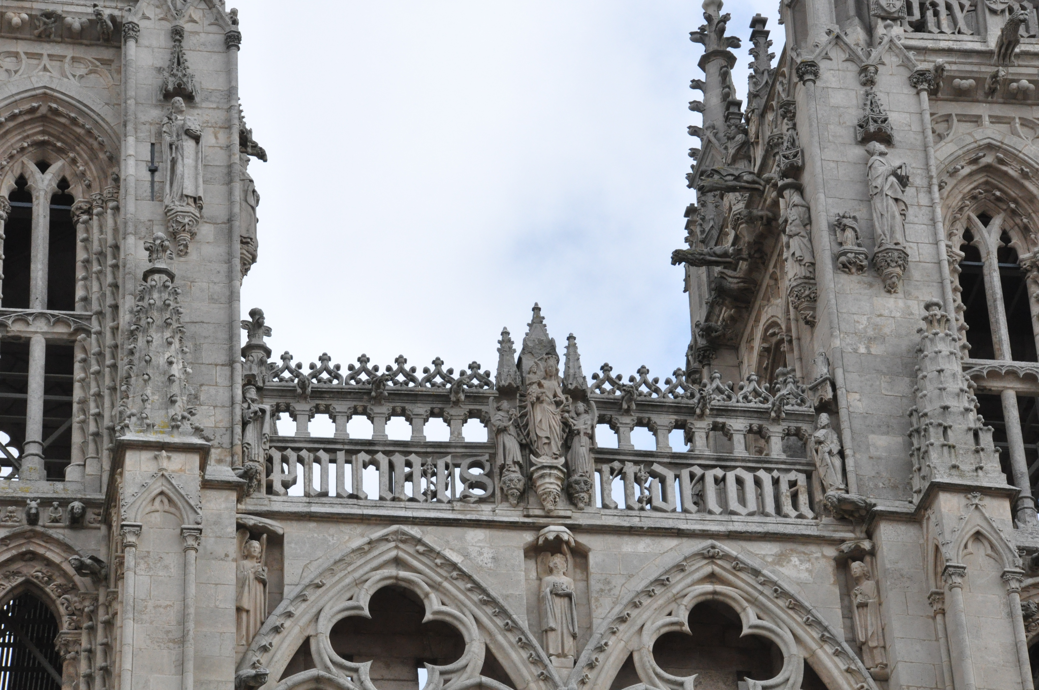 Remate de la parte central de la fachada de la Catedral a la plaza de Sta María de Burgos, realizada por Juan de Colonia